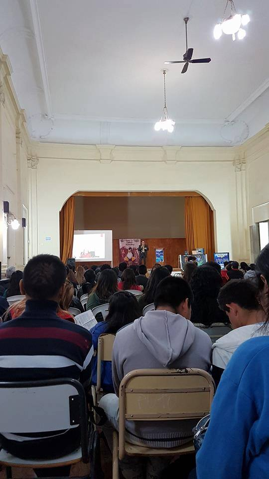 Profesor Manresa en el Software Freedom Day 2016 en Salta, Argentina.